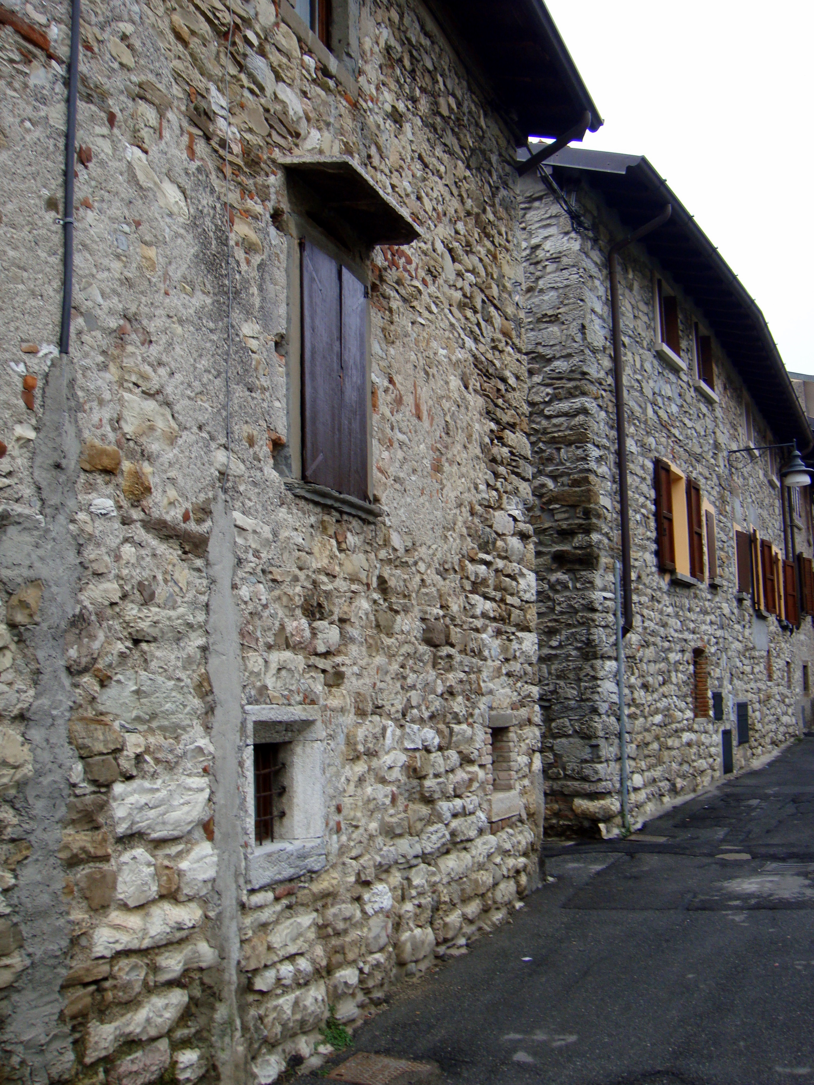 Sorisole antica, Via Vittorio Veneto